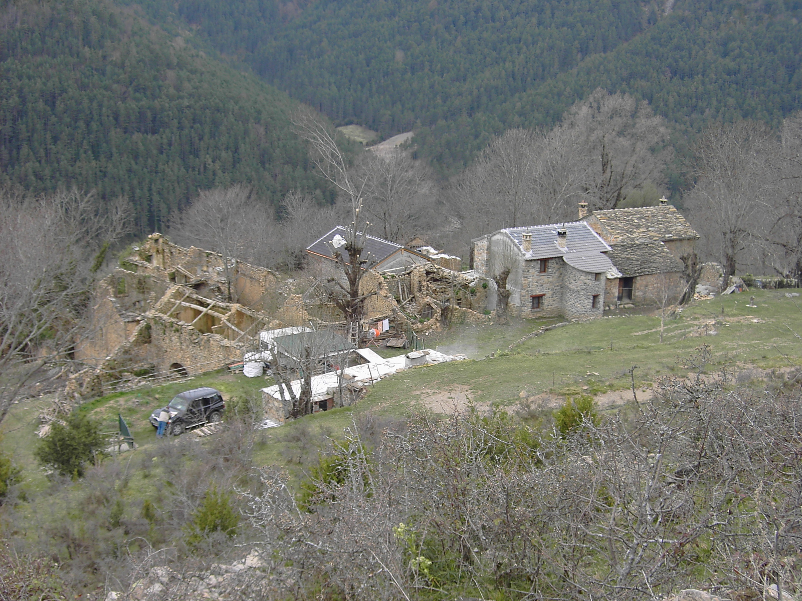 El núcleo de Sercué, en la Bal de Bió (municipio de Fanlo), estubo completamente deshabitado durante décadas, ahora empieza a despertar con la recuperación de algunas de sus casas como segundas residencias.